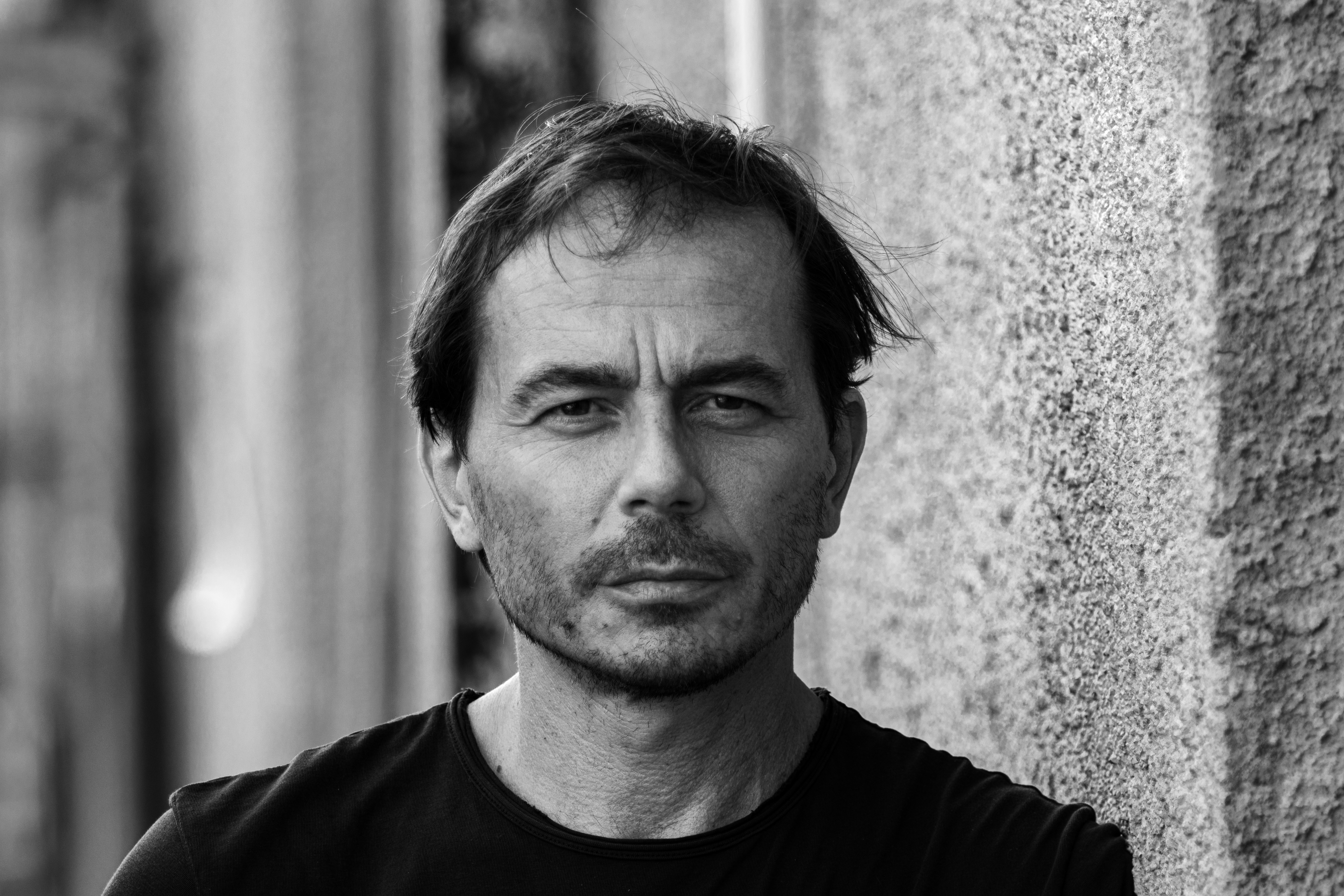 Ritratto